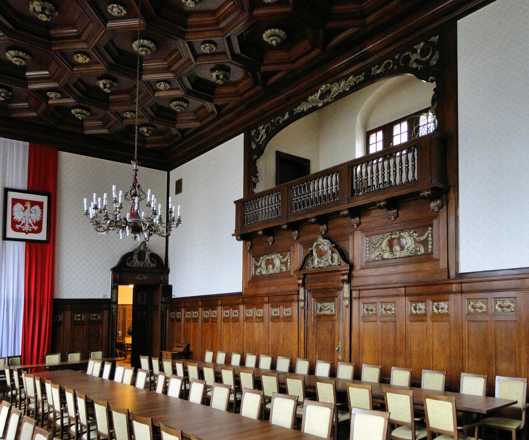 Zachodniopomorski Urząd Wojewódzki w Szczecinie, wnętrze - sala konferencyjna